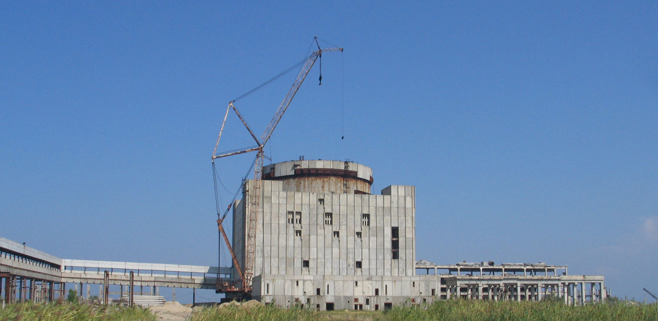 Крымская АЭС